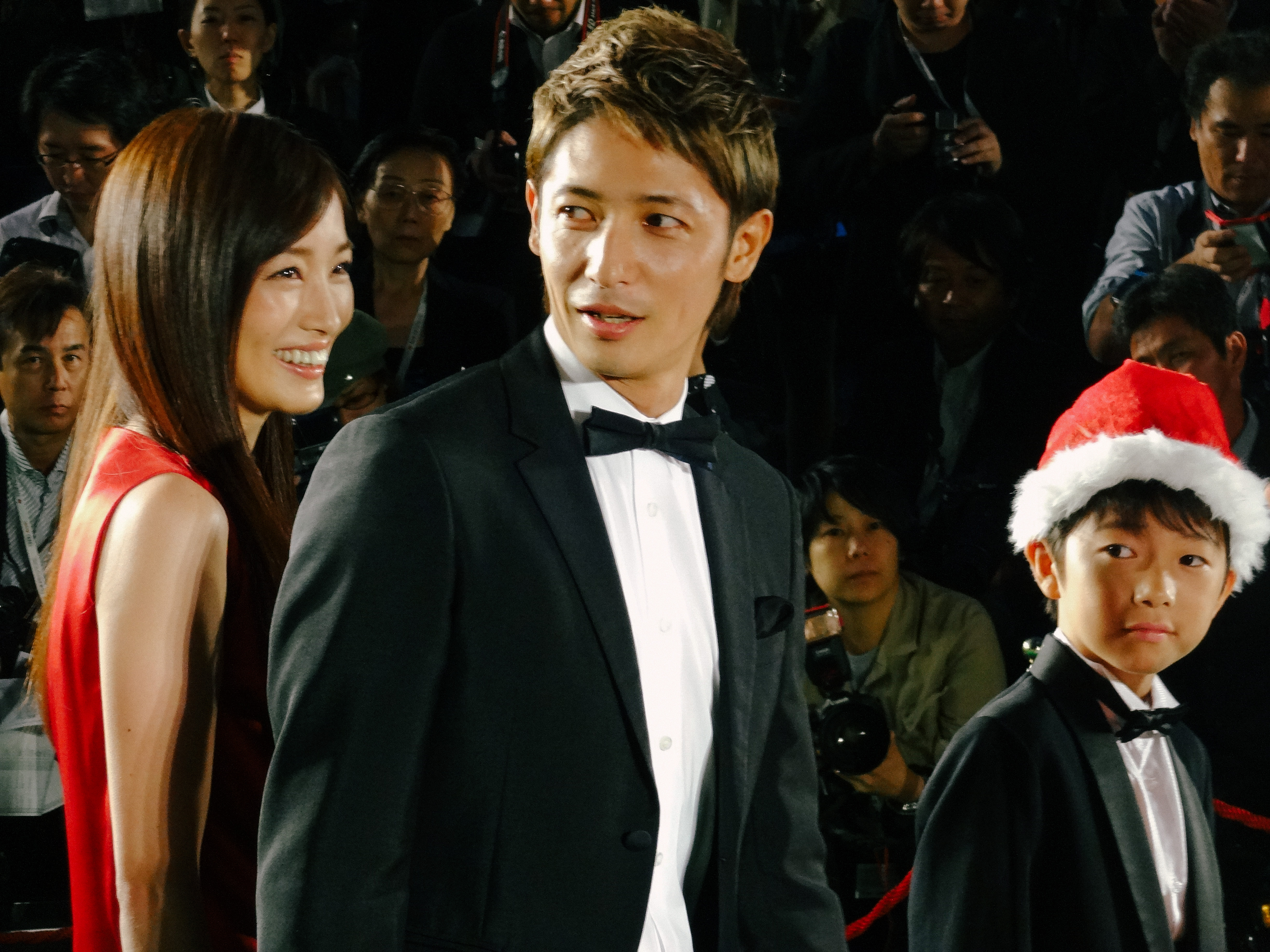 第26回 東京国際映画祭 玉木宏 山崎竜太郎 高梨臨 (すべては君に逢えたから)